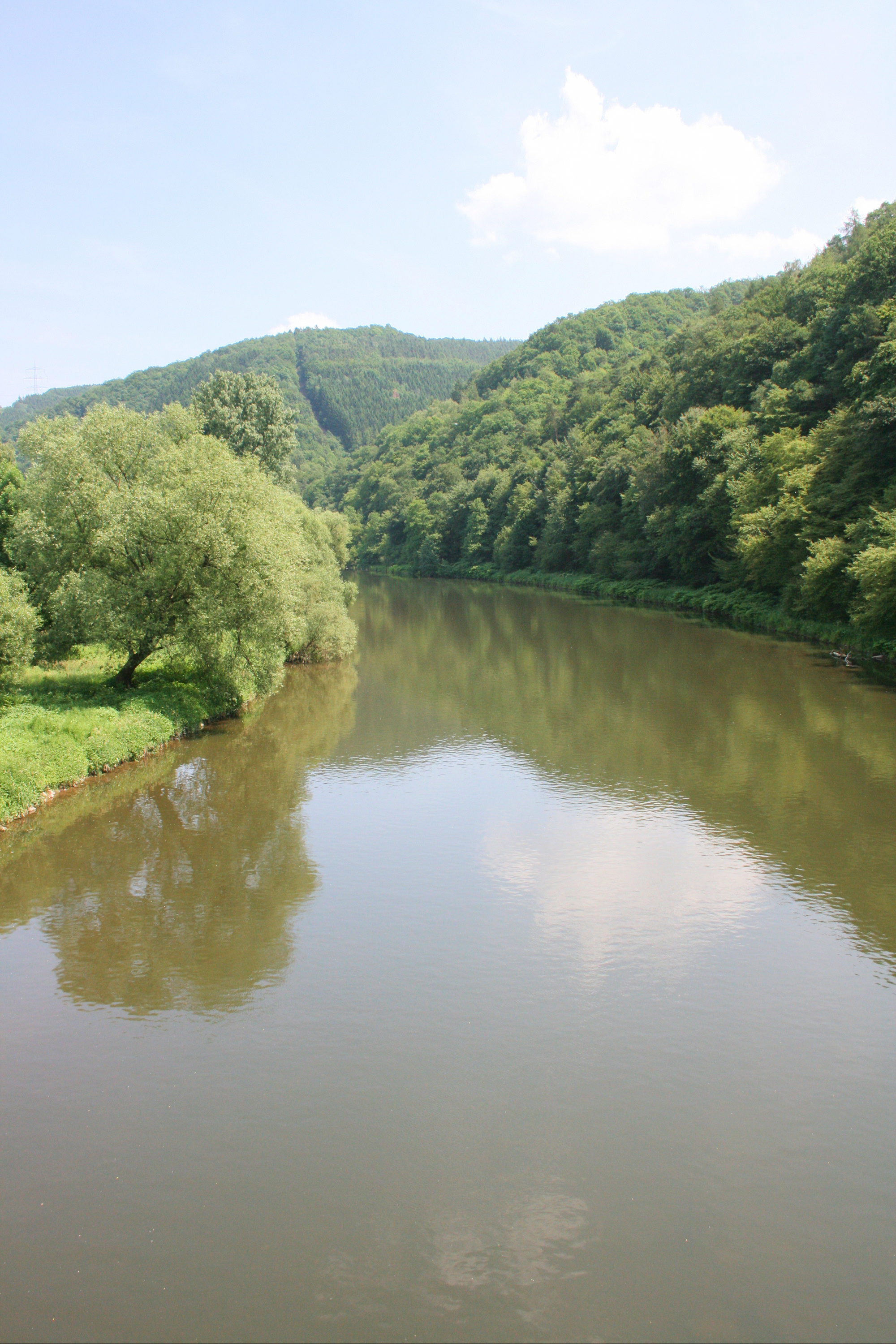 Waldgebiet Leuscheid über der Sieg